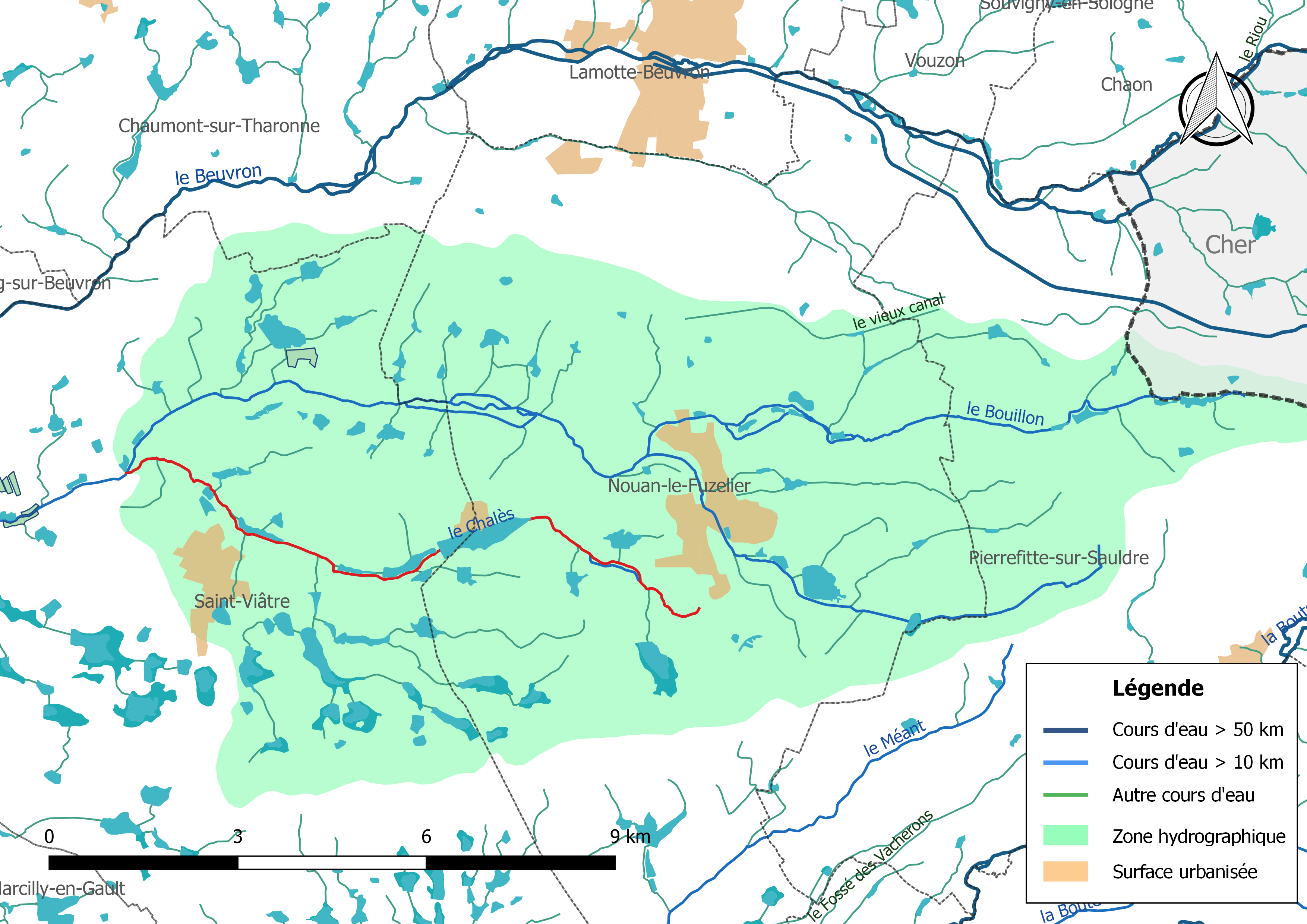 Carte du cours d'eau « le Chalès » et de son bassin versant (zone hydrographique dans laquelle il s'insère).